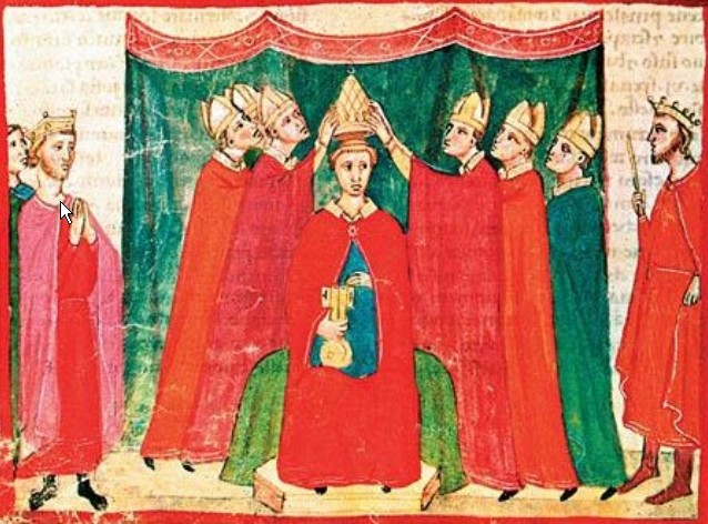 Klement V.